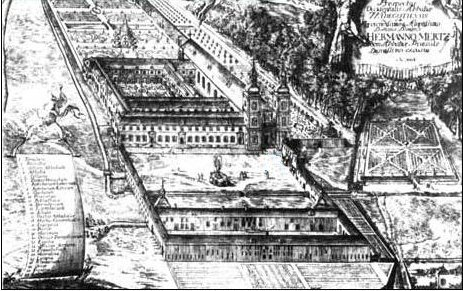 Idealansicht der Prämonstratenserabtei Wadgassen angefertigt unter Abt Hermanno Mertz von Johann Georg Weiser im Jahre 1736